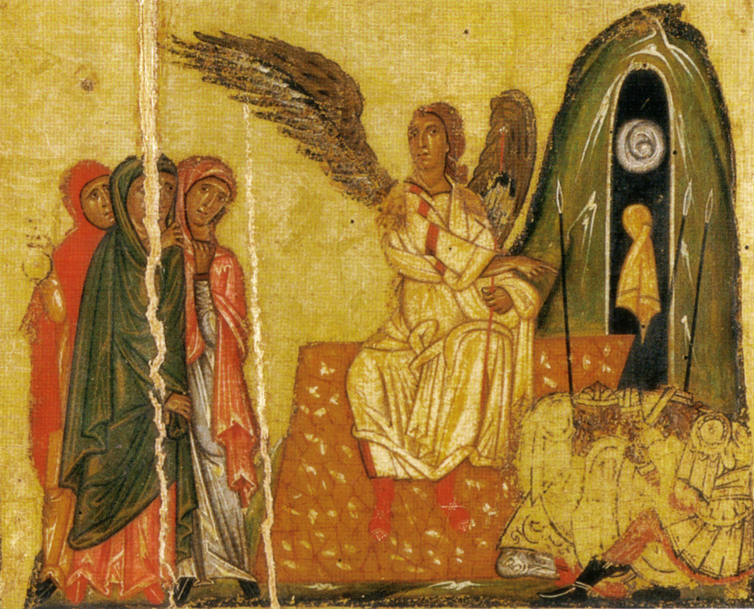 pie donne al sepolcro detail